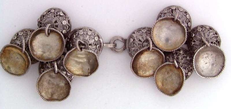 Maljespenne av sølv i filigansadbeid fra Thomas Heftyes samlinger. Foto Anne-Lise Reinsfelt / Norsk Folkemuseum, NF1921-0629AB.